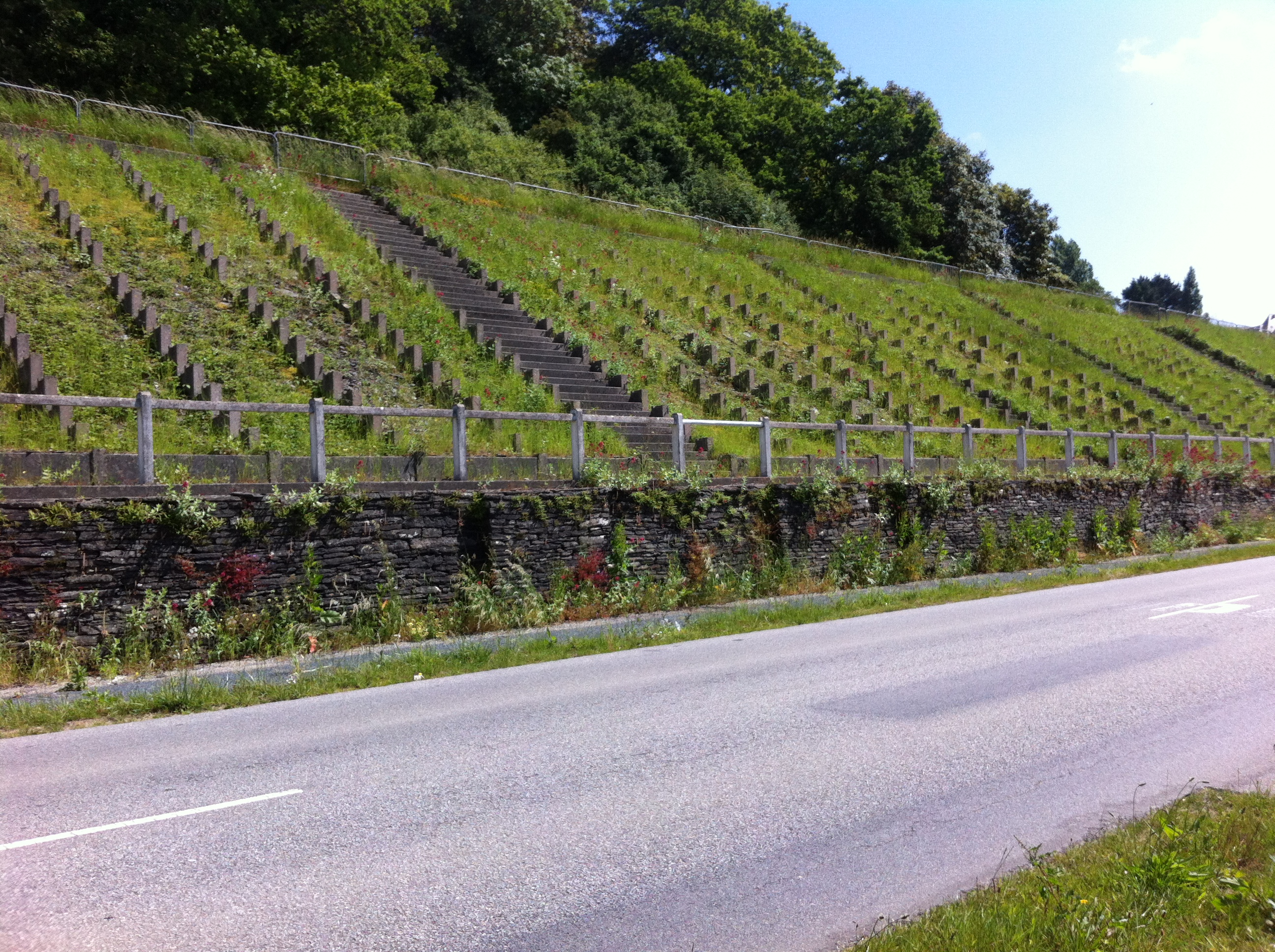 Chateaulin - gradins des boucles de l'Aulne